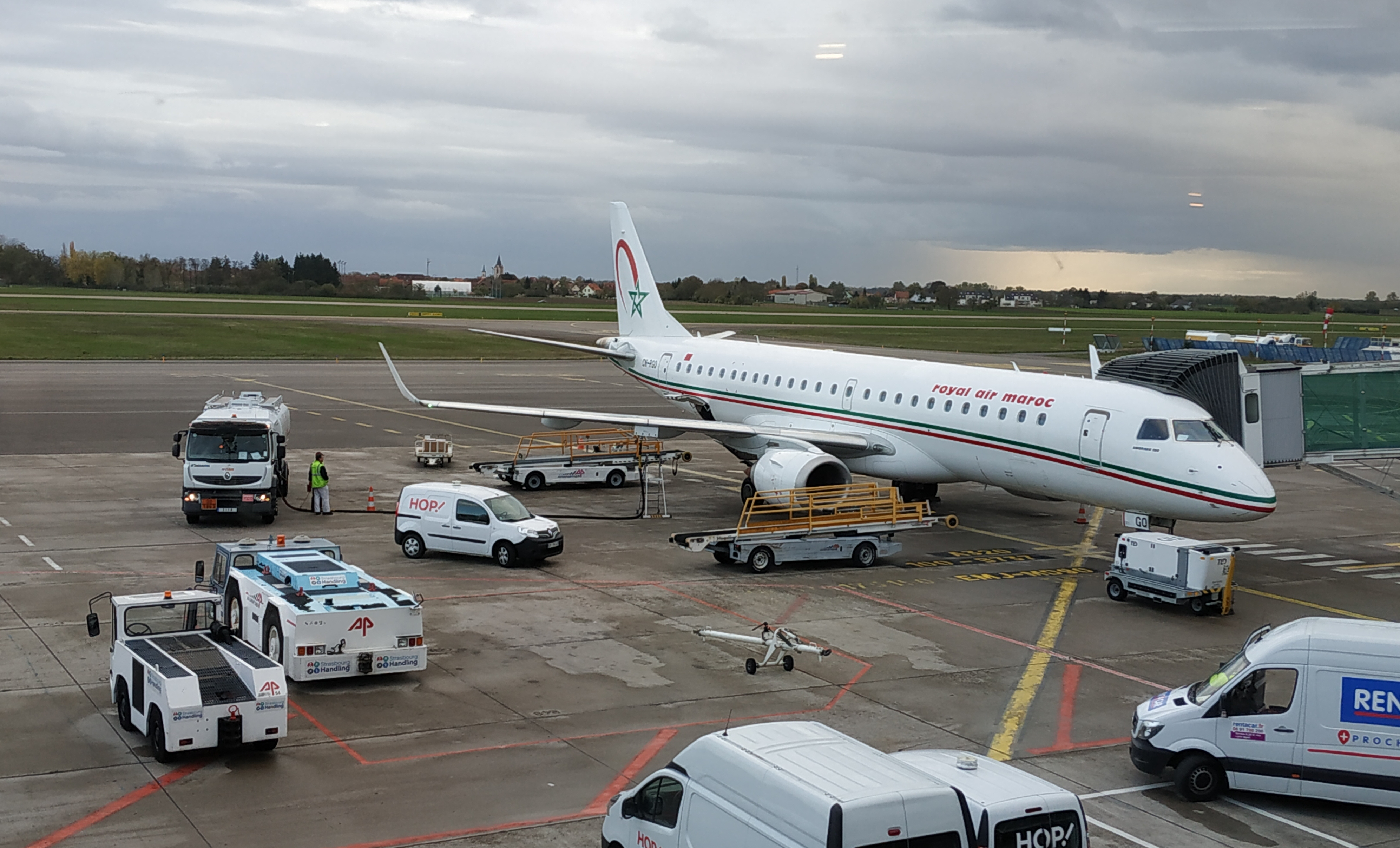 Embraer de Royal Air Maroc à l'aéroport de Strasbourg Entzheim